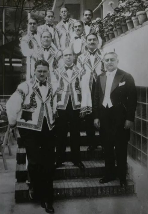 Grigoras Dinicu si orchestra sa.